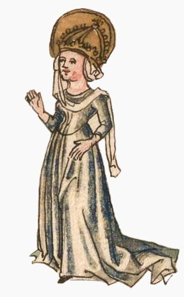 Kaiser Karl der Große stfitet mit seiner Königin Hildegard das Kemptener Kloster.